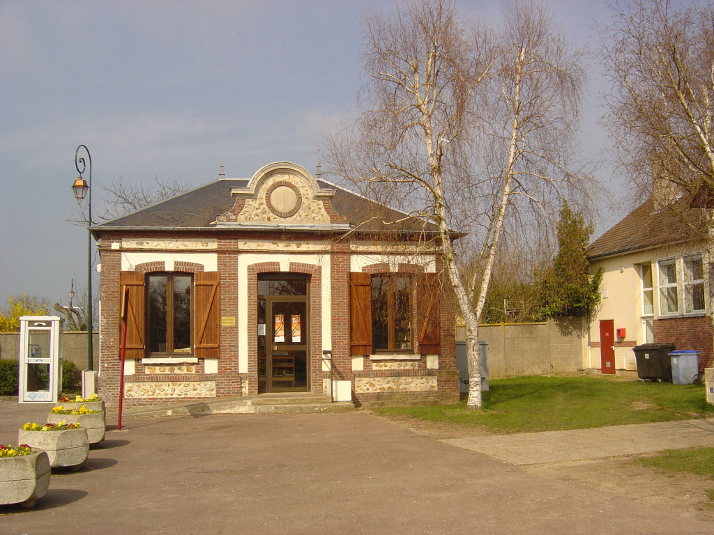 Bibliotheque de Guichainville (Eure, Normandie, France)